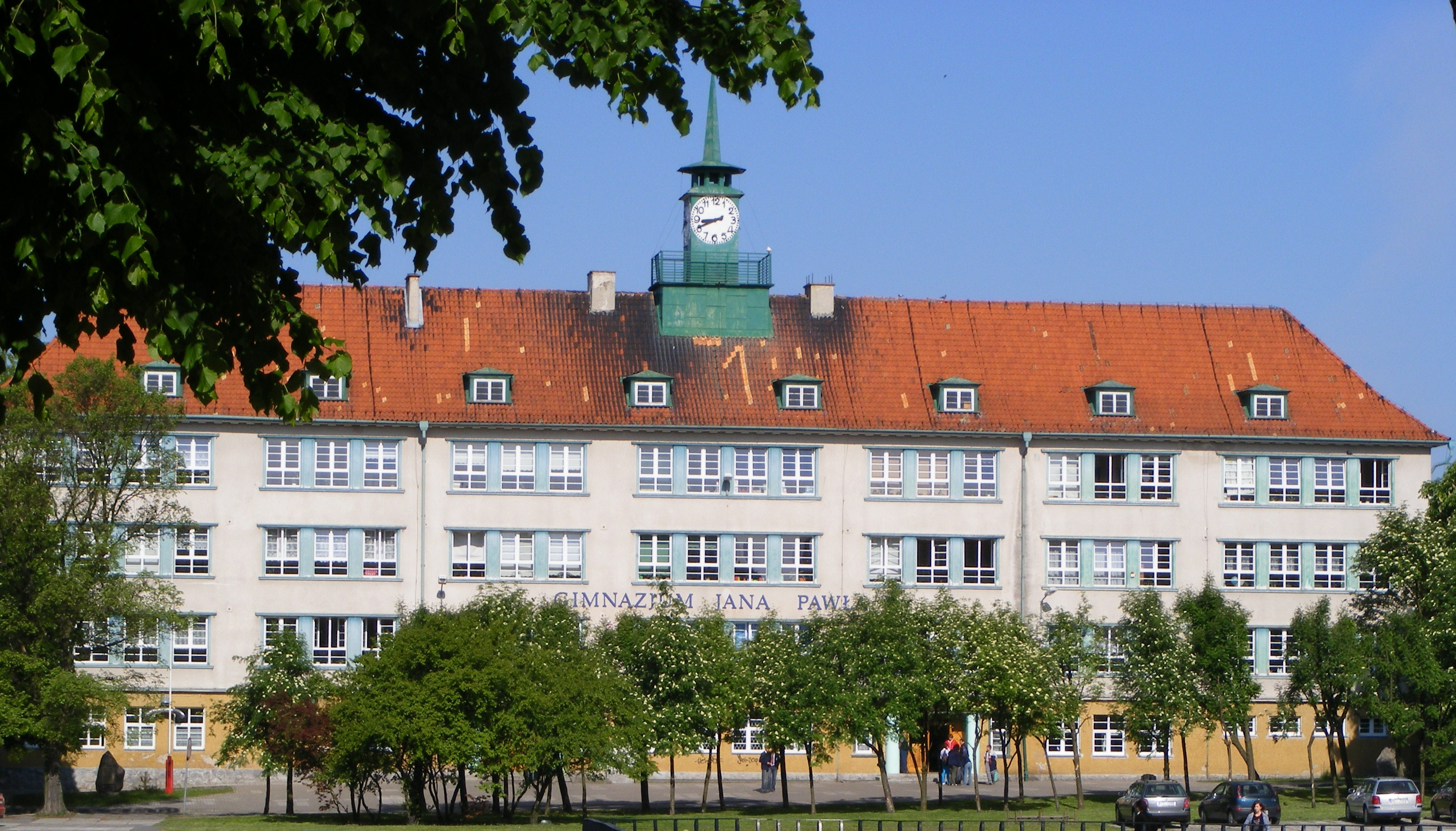 Gimnazjum.